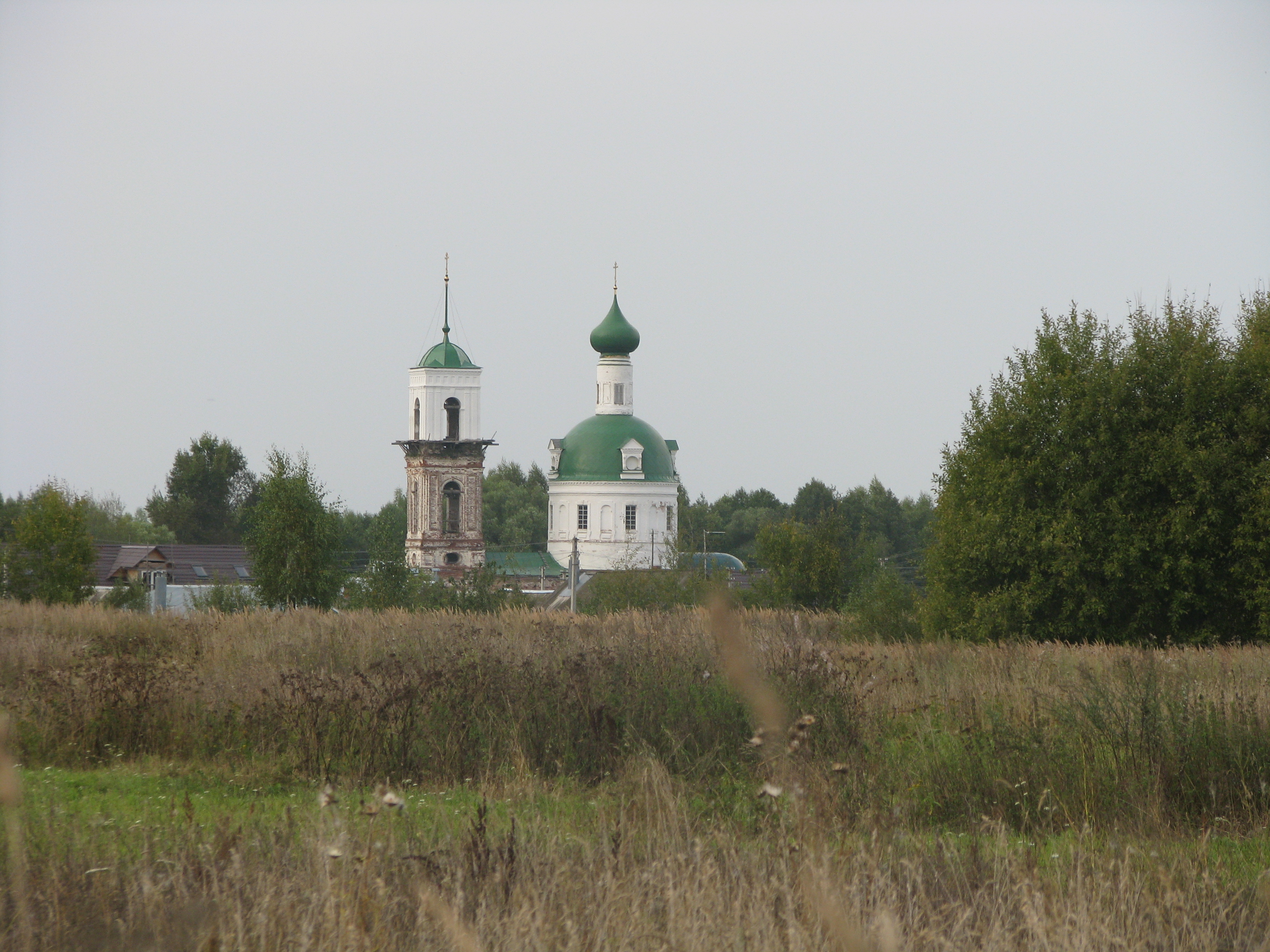 Церковь Никольская: Мугреево-Никольское, Южский район, Ивановская область. Общий вид с юга